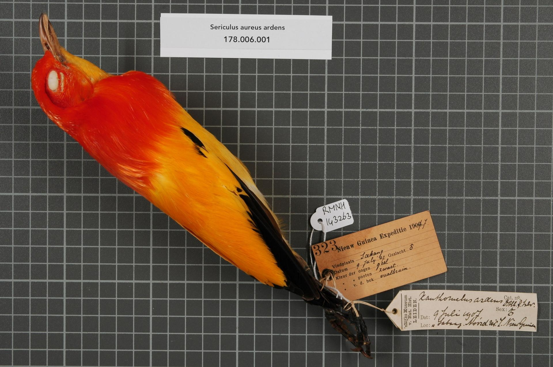 Sericulus aureus ardens (D'Albertis & Salvadori, 1879)